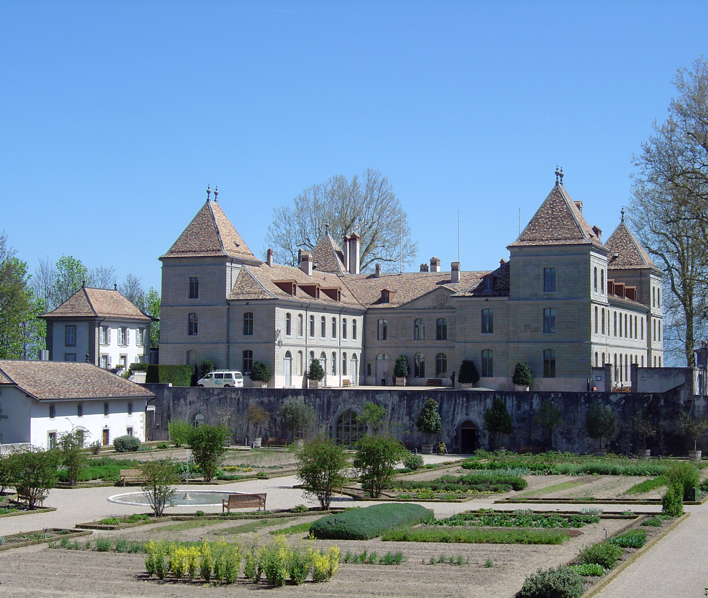 Schloss Prangins in der Gemeinde Prangins, Kanton Waadt, Schweiz